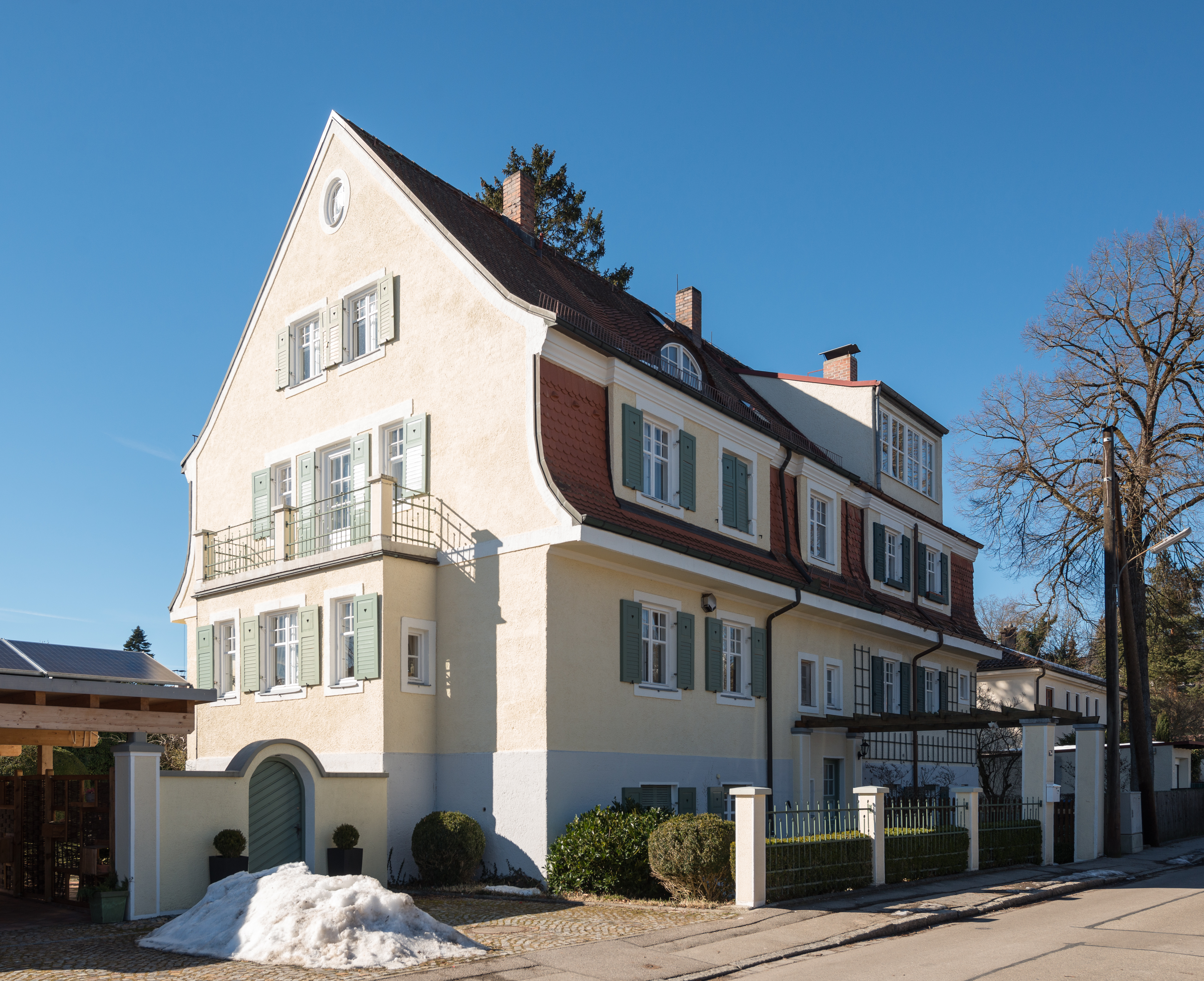 Denkmalgeschütztes Gebäude in Stockdorf